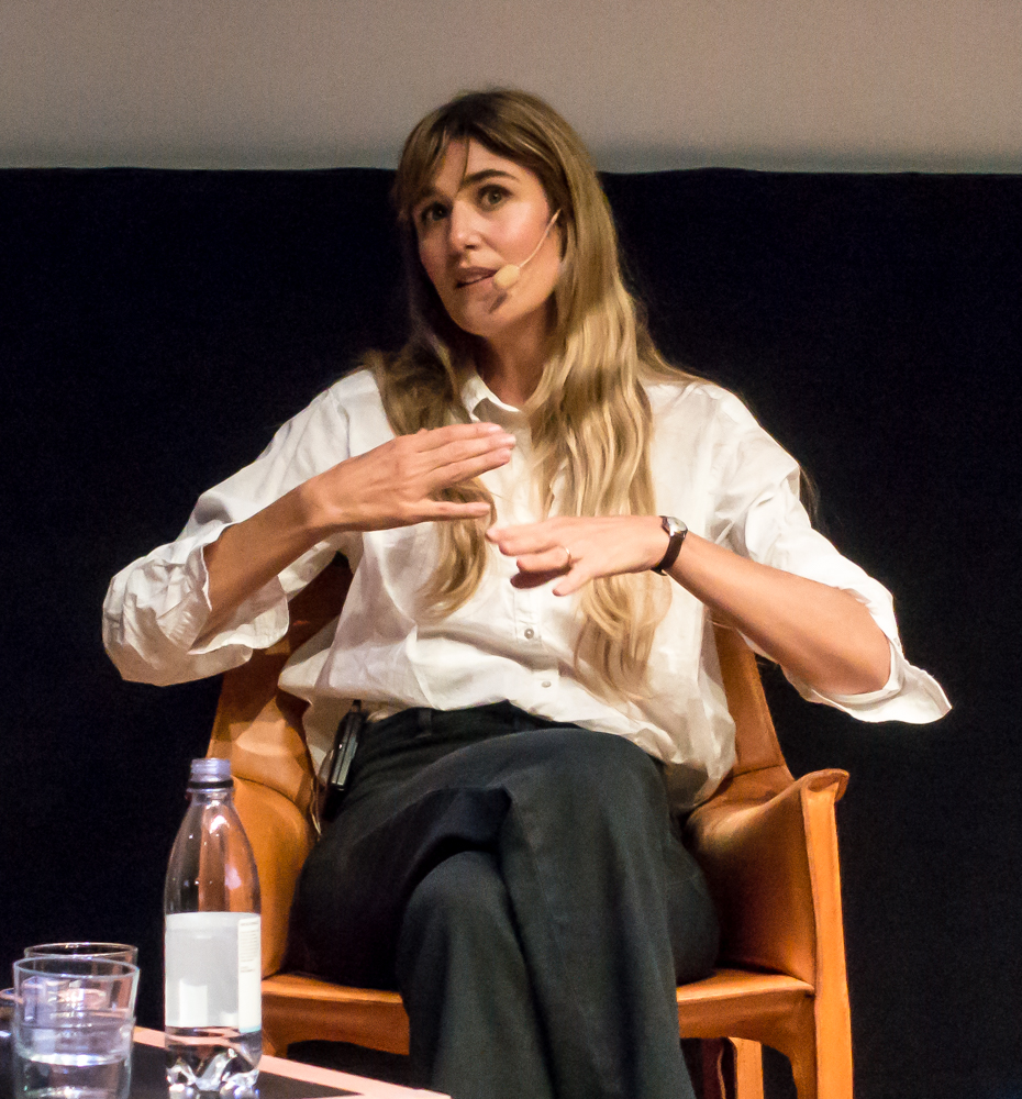 Lisa Langseth under ett samtal med Marie-Louise Ekman på Moderna museet den 2 september 2017.